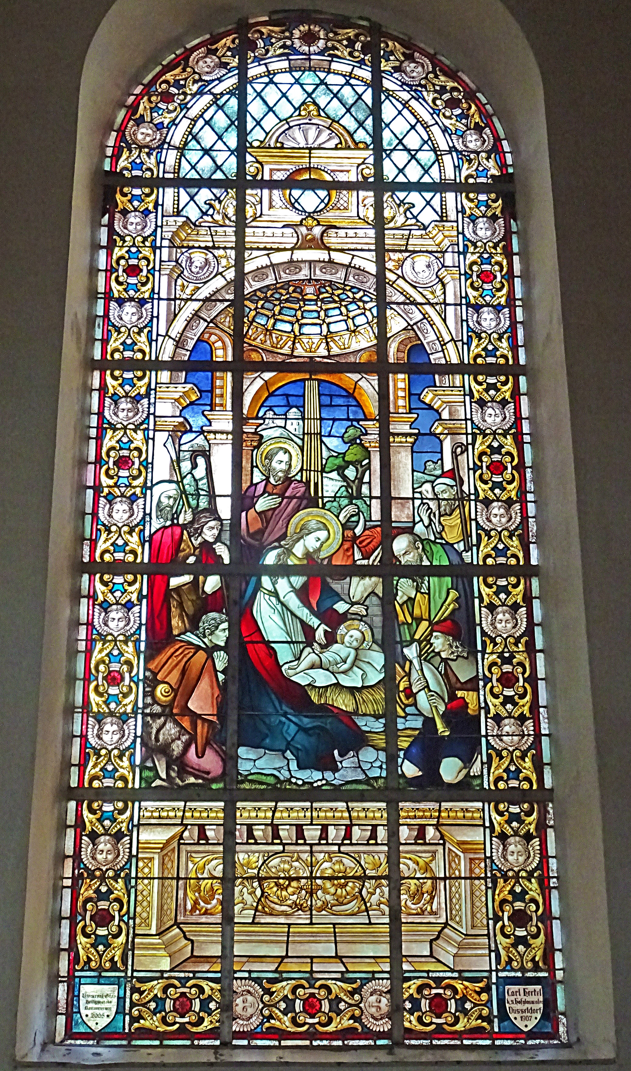 Buntglasfenster in der Dorfkirche St. Bartholomäus (Hohengandern)